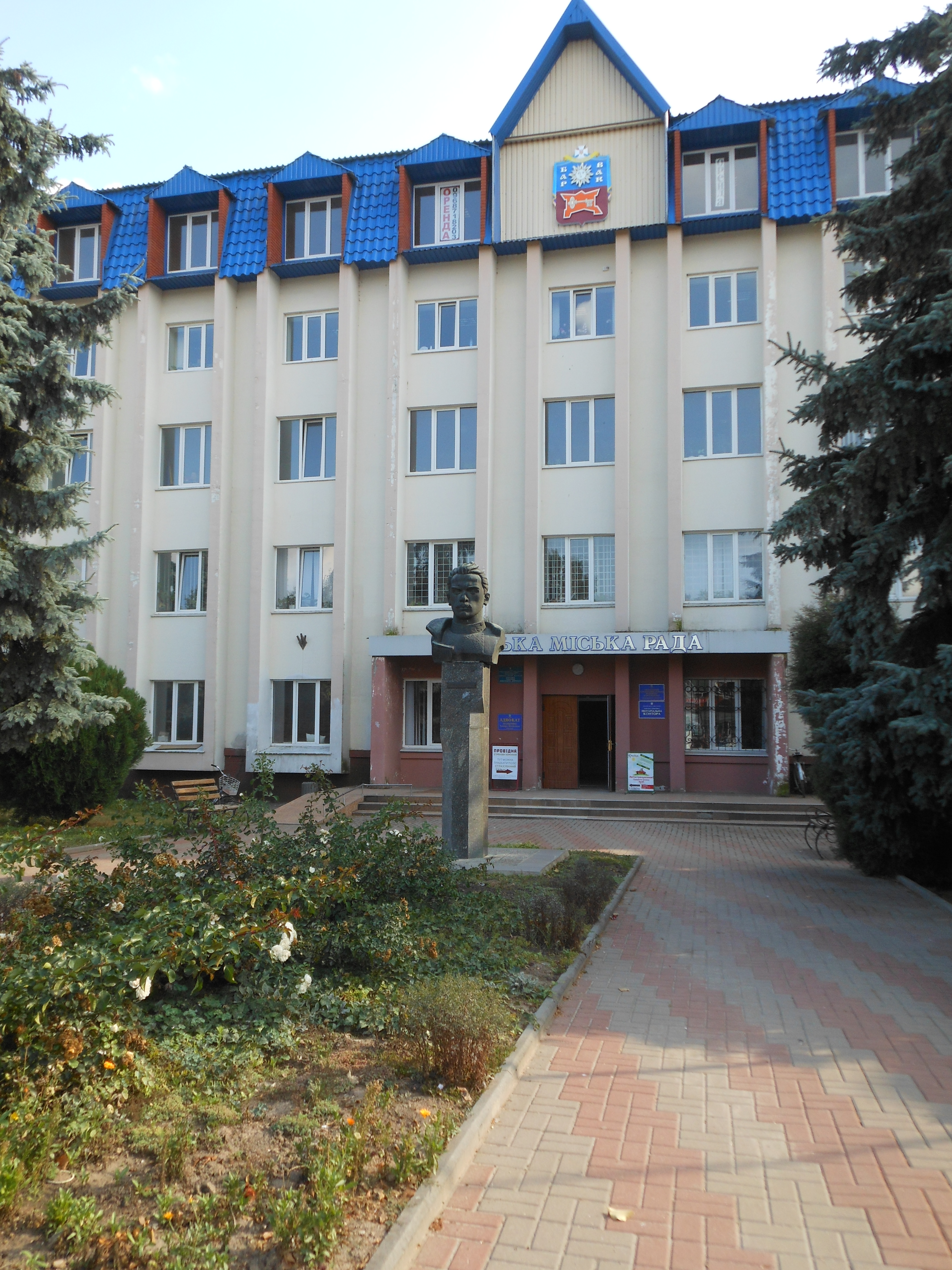 Пам'ятник Врублевському, Бар, вул. Врублевського